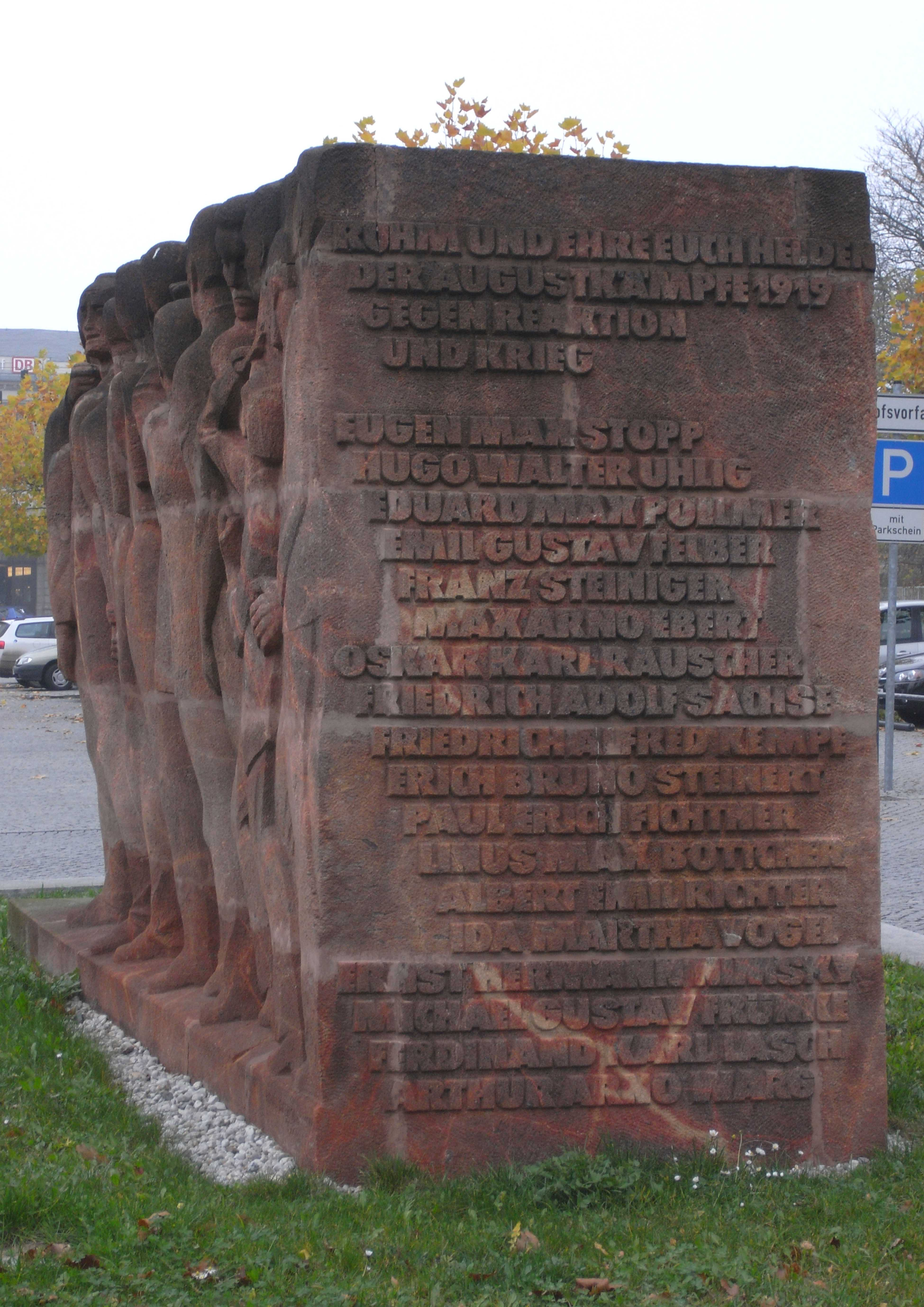 Chemnitz, Bahnhofsplatz, Denkmal für die Gefallenen von 1919, von Hanns Diettrich 1977 (Sachen, Deutschland)